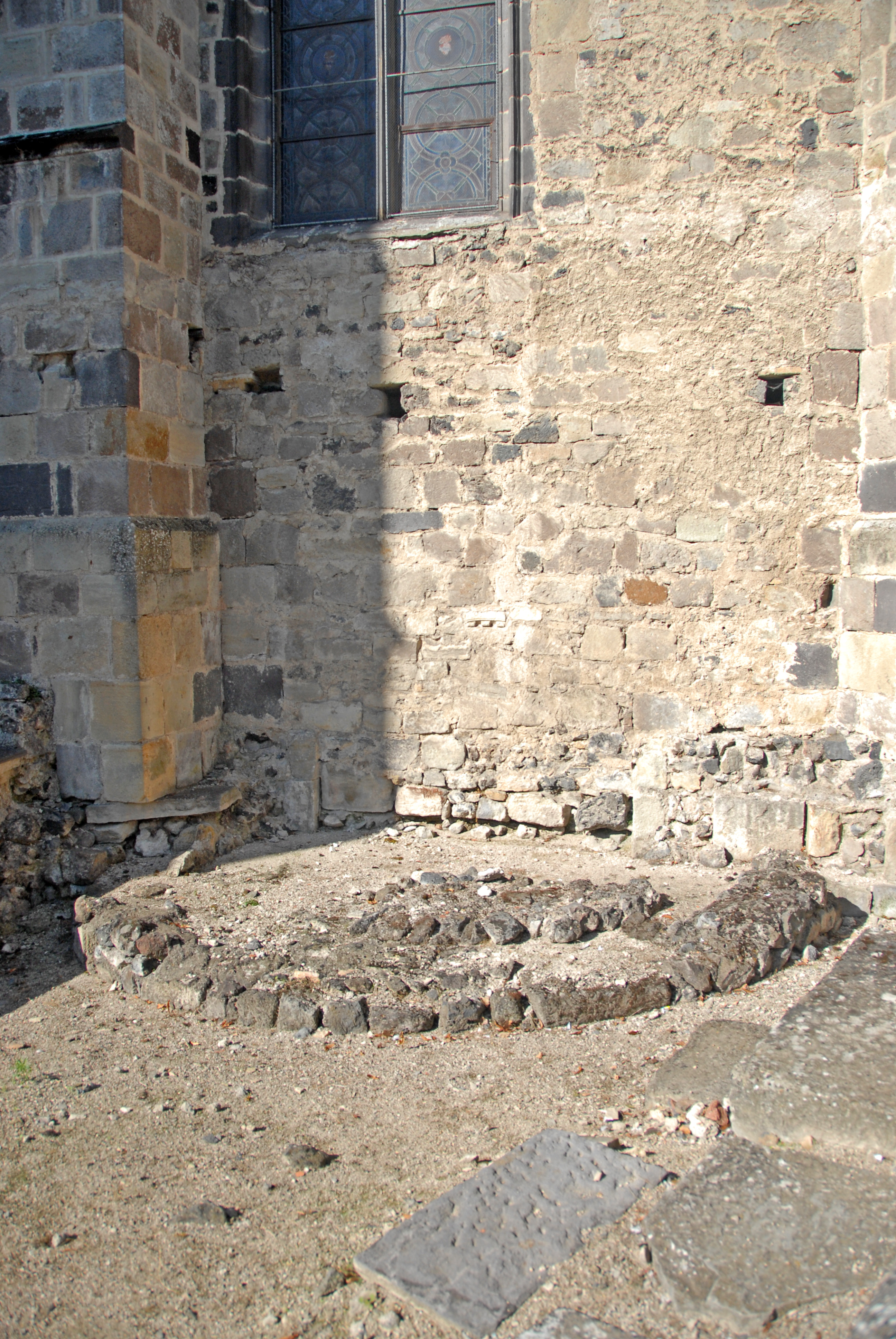 Mozat, Boden ehem. Querhauskapelle